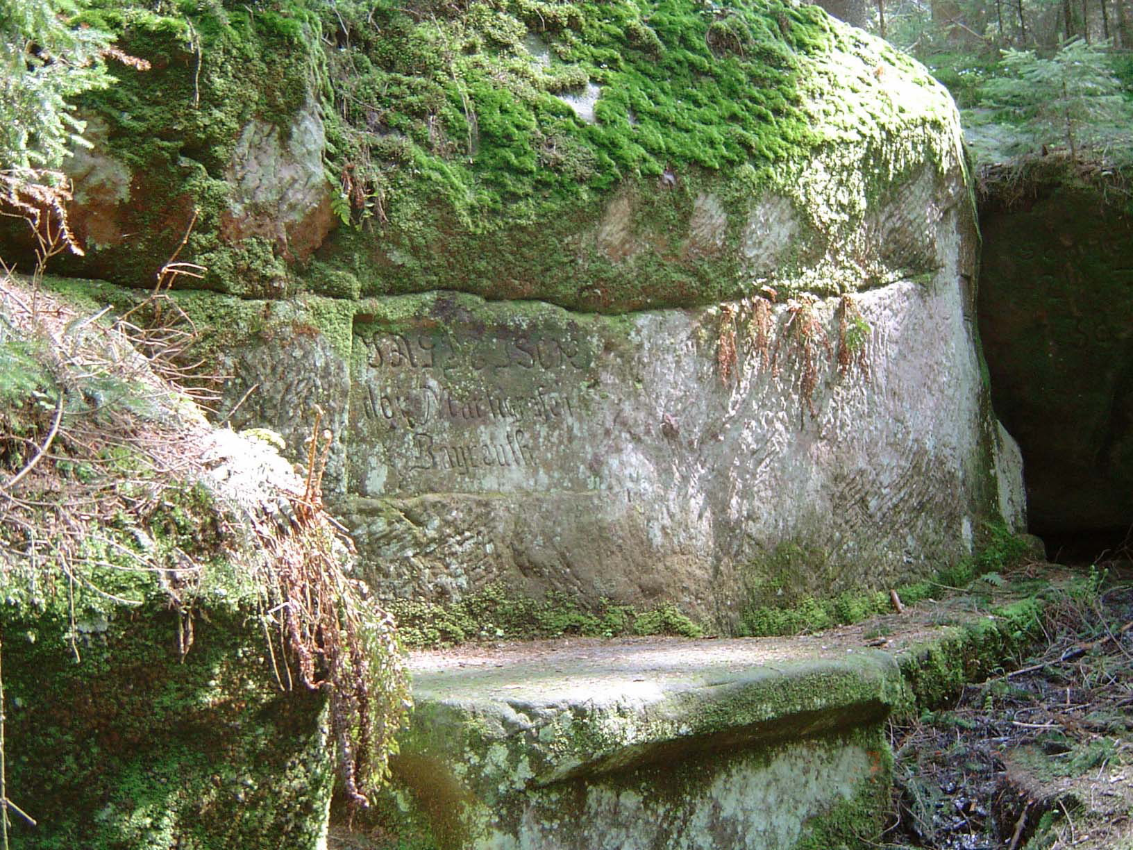 Zw. Mistelbach-Hardt, sogen. Jagdtisch der Markgrafen (mit Sitzbank), Waldgebiet Arzloch, Denkmal Nr. D-4-72-166-8